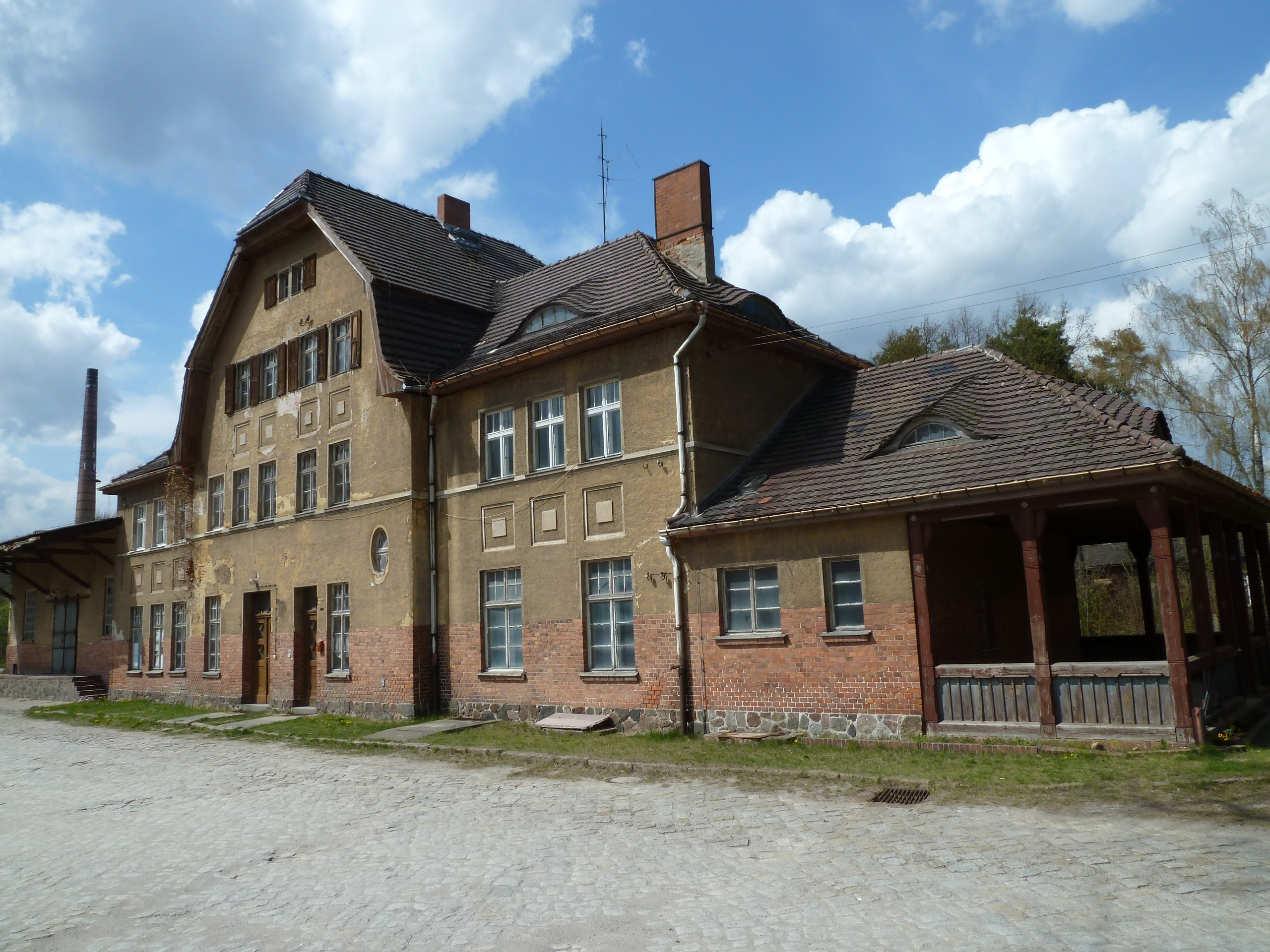 Bahnhof Crinitz, Baudenkmal